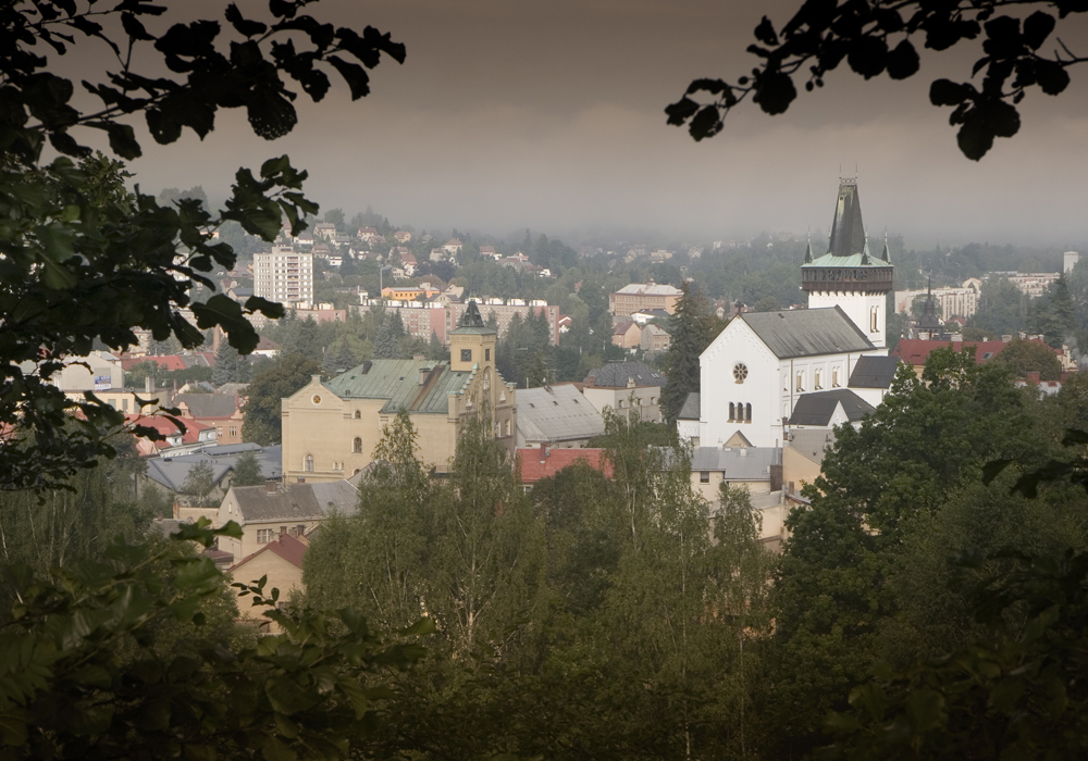 Semily - pohled na město